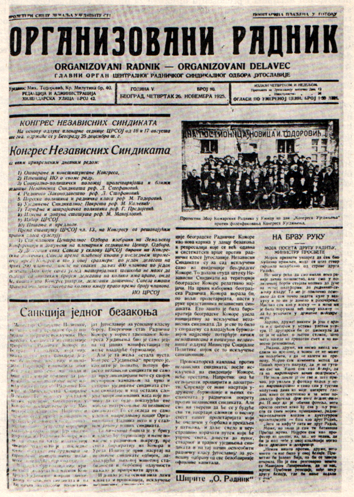 Srpskohrvatski / српскохрватски: Sindikalno glasilo Organizovani radnik iz 1925. godine.